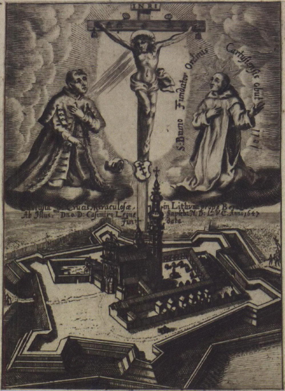 Беларуская (тарашкевіца): Бяроза Картуская (Biaroza Kartuskaja), кляштарны комплекс картузаў. Казімер Леў Сапега (Kazimier Leŭ Sapieha) і Сьвяты Бруно